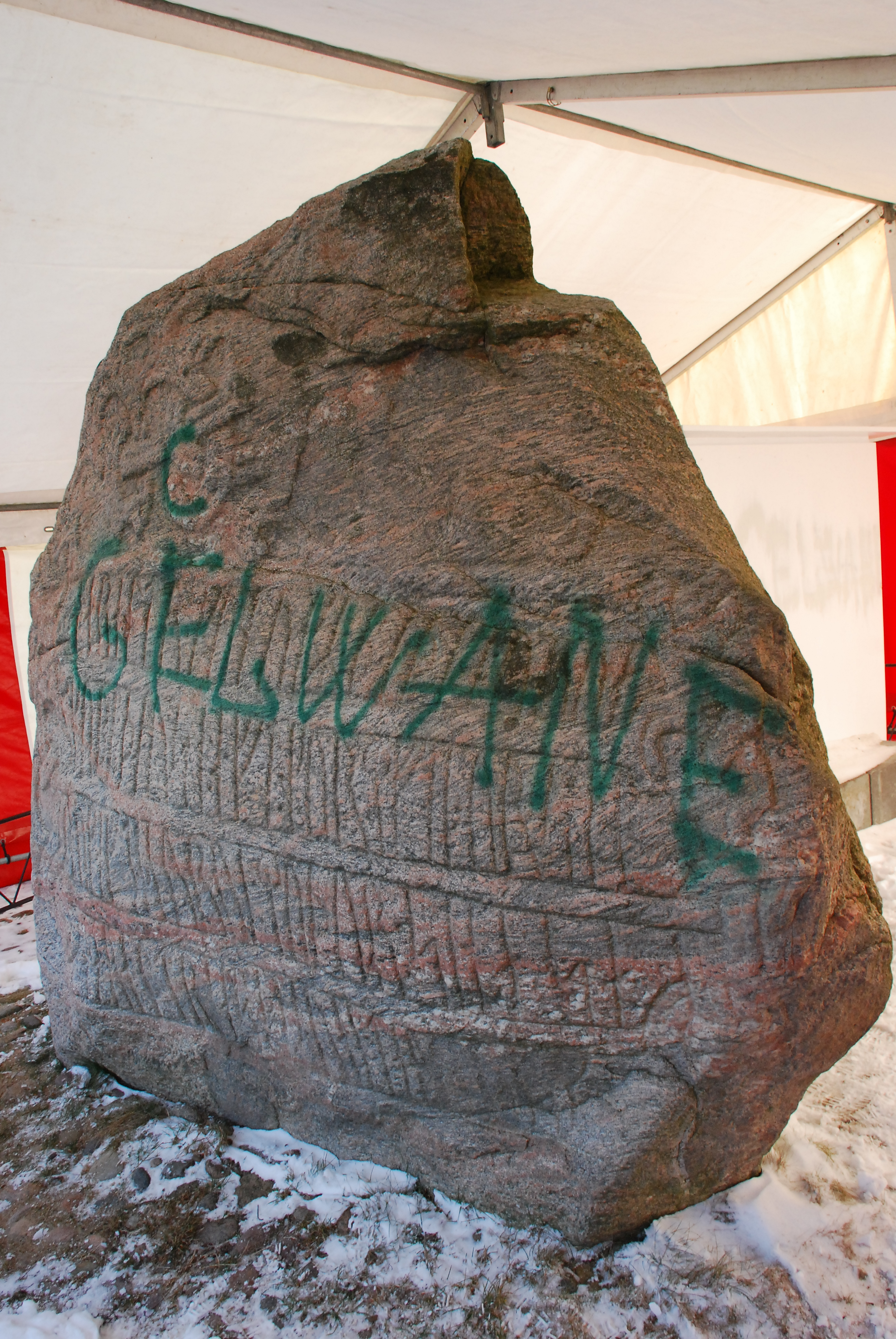 Jelling 19-02-11